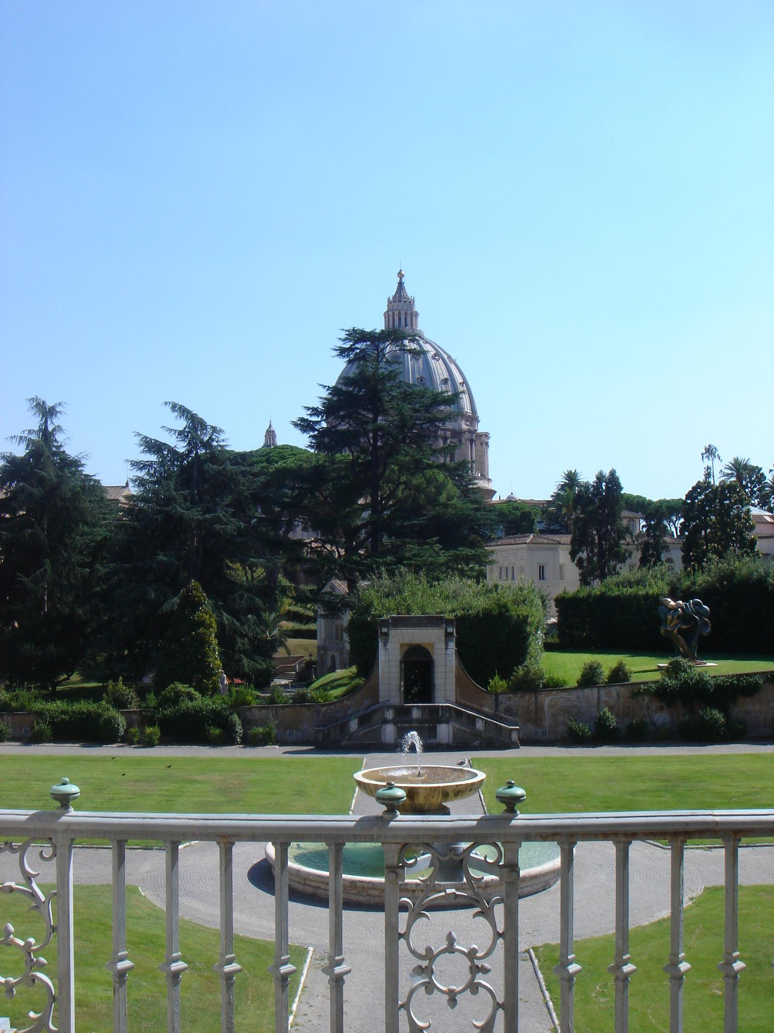 Pinacoteca del Museo Vaticano, Città del Vaticano: vista verso i Giardini Vaticani, la Casina Pio IV e la Basilica di San Pietro